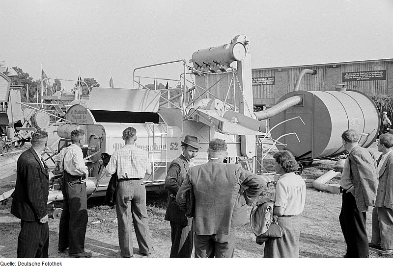 Original image description from the Deutsche Fotothek Landwirtschaftliche Maschine (Mähdrescher)